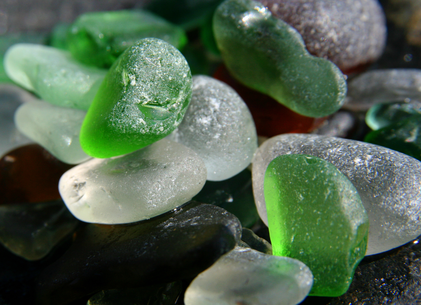 Amanter, stenslipt glass